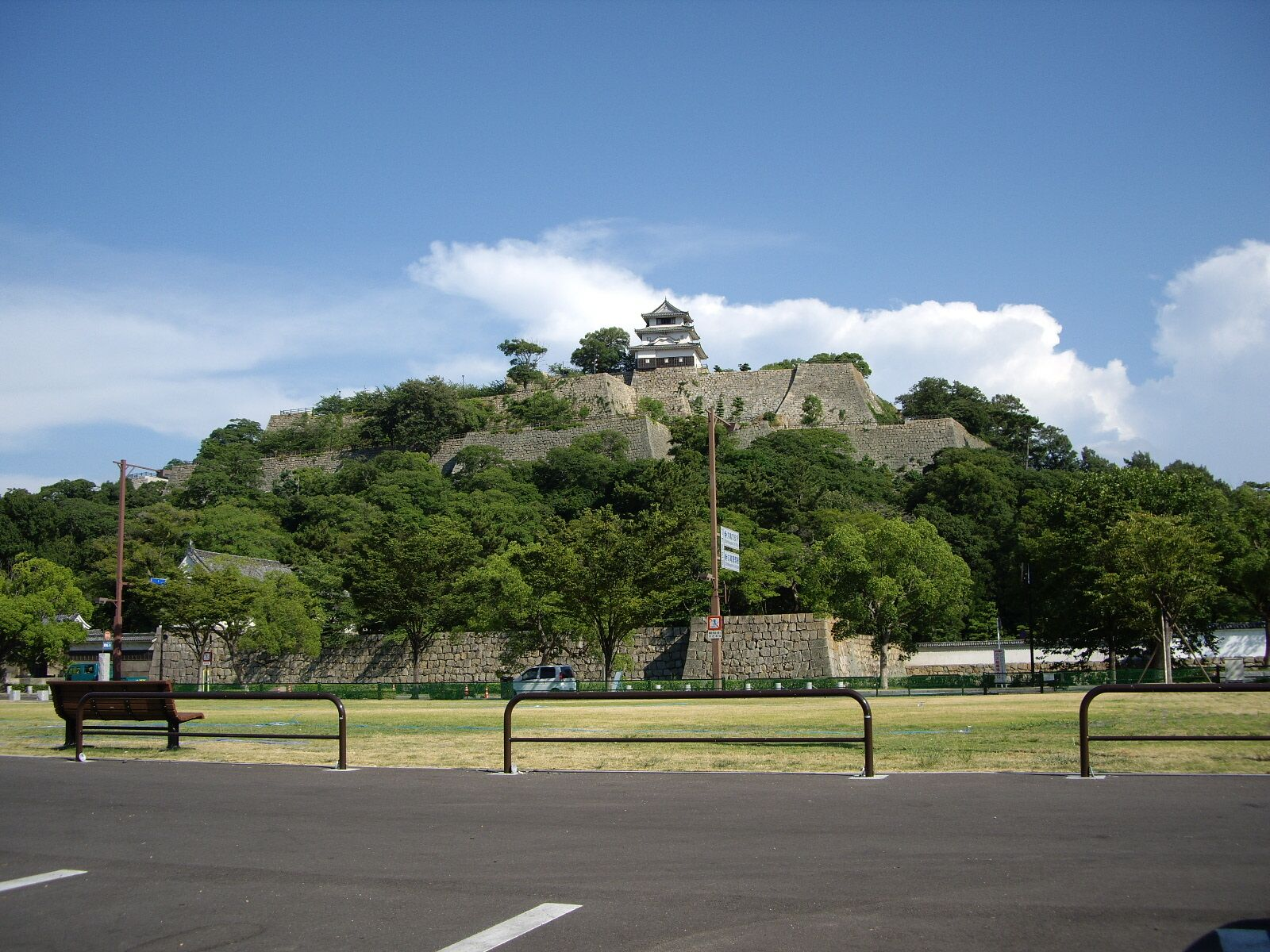 丸亀城 - 日本国香川県丸亀市。